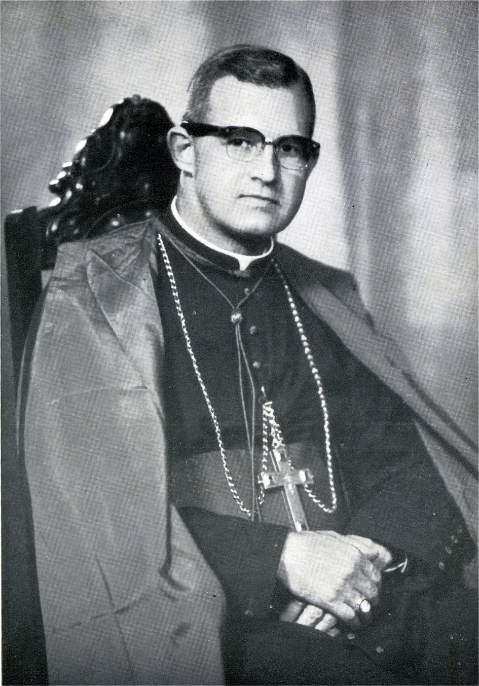 Foto segundo Bispo Diocesano de Sorocaba